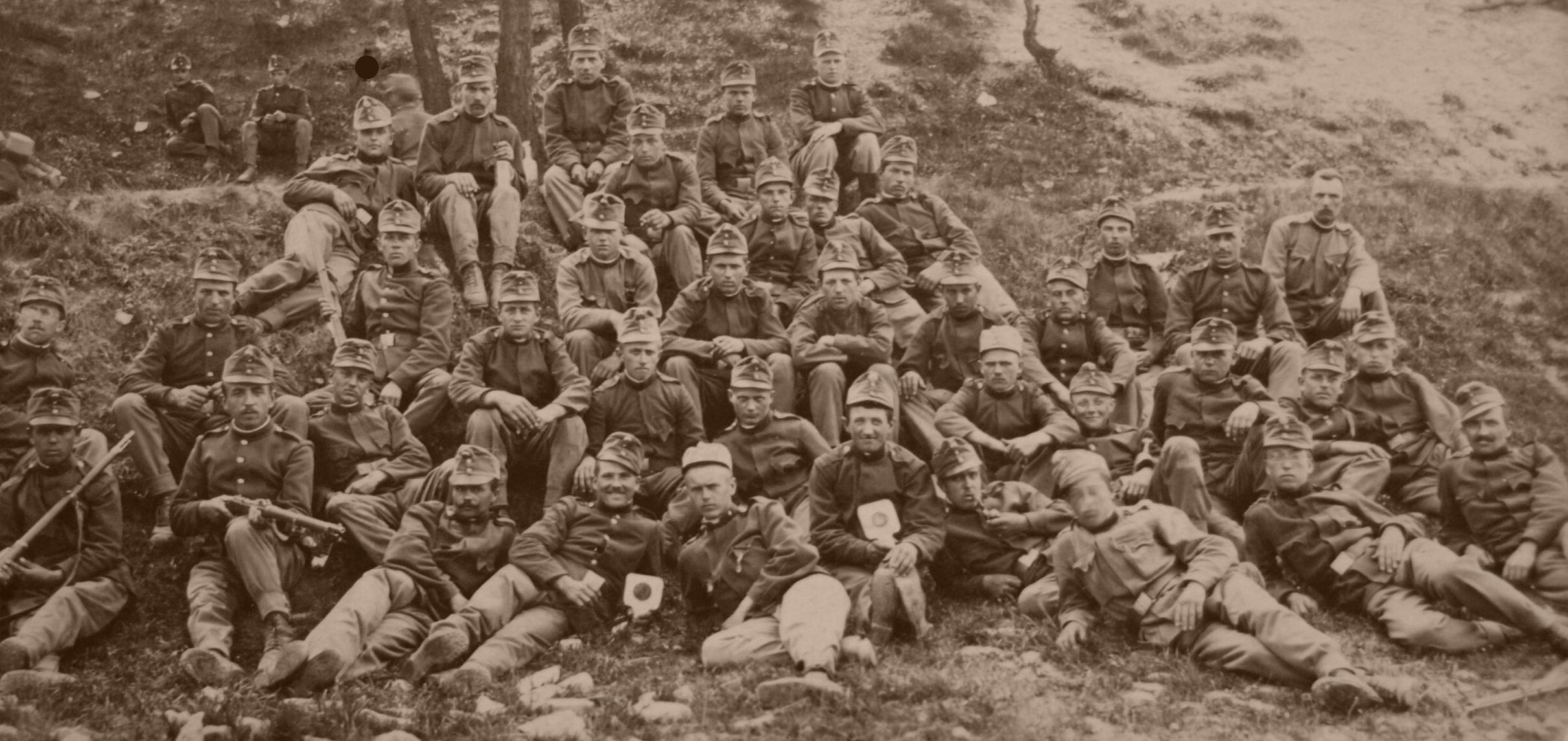 Alois Laub (vlevo, označen) v květnu 1915 u 1. čety 2. kompanie 12. maršbatalionu 88. pěšího pluku c. k. armády